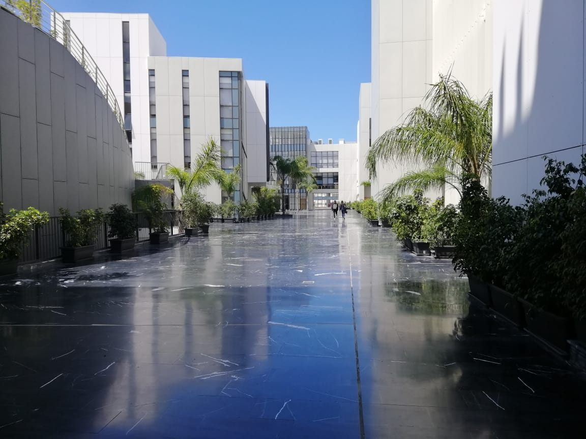 Enceinte